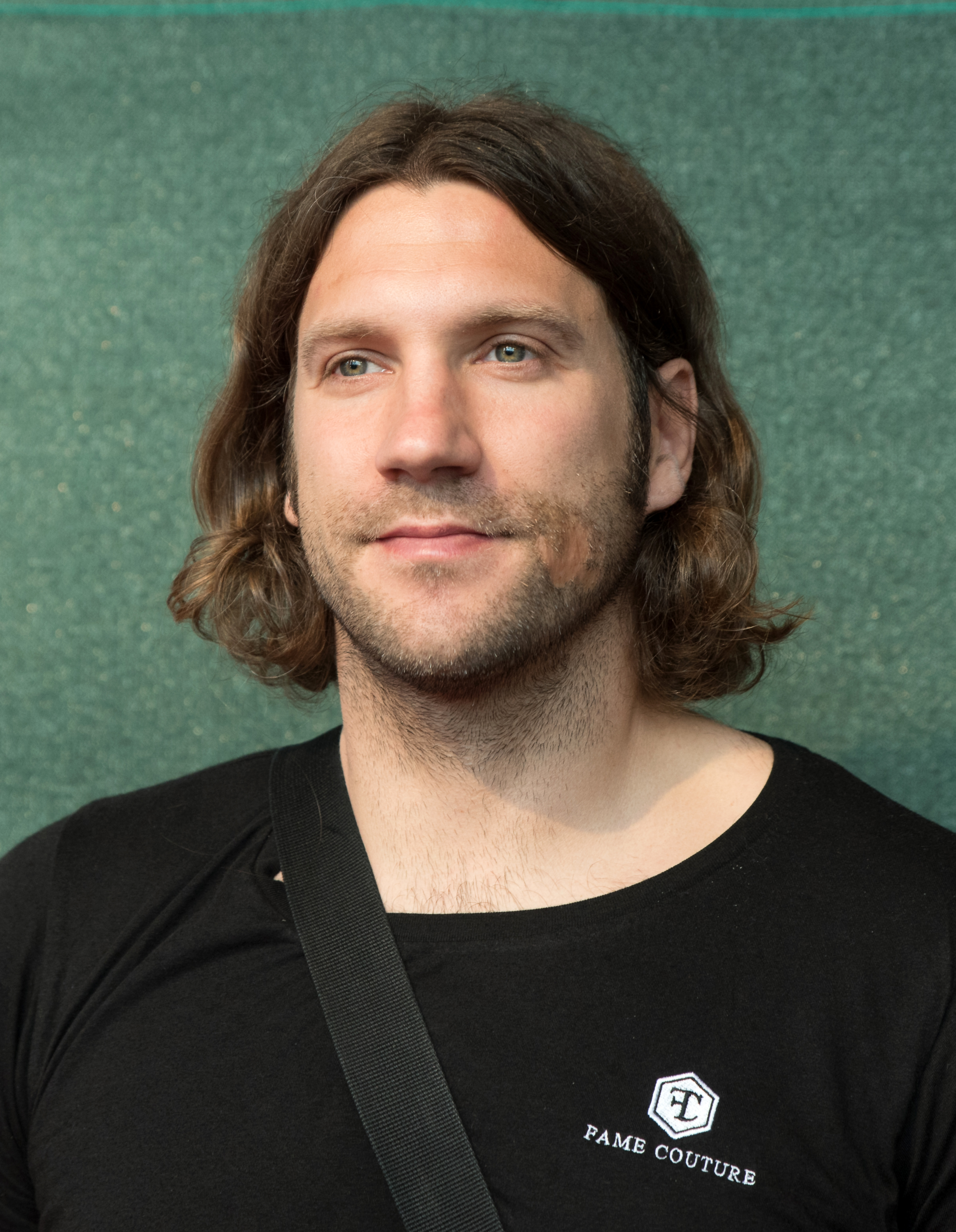 Torsten Frings beim Tag der Legenden 2016 in Hamburg